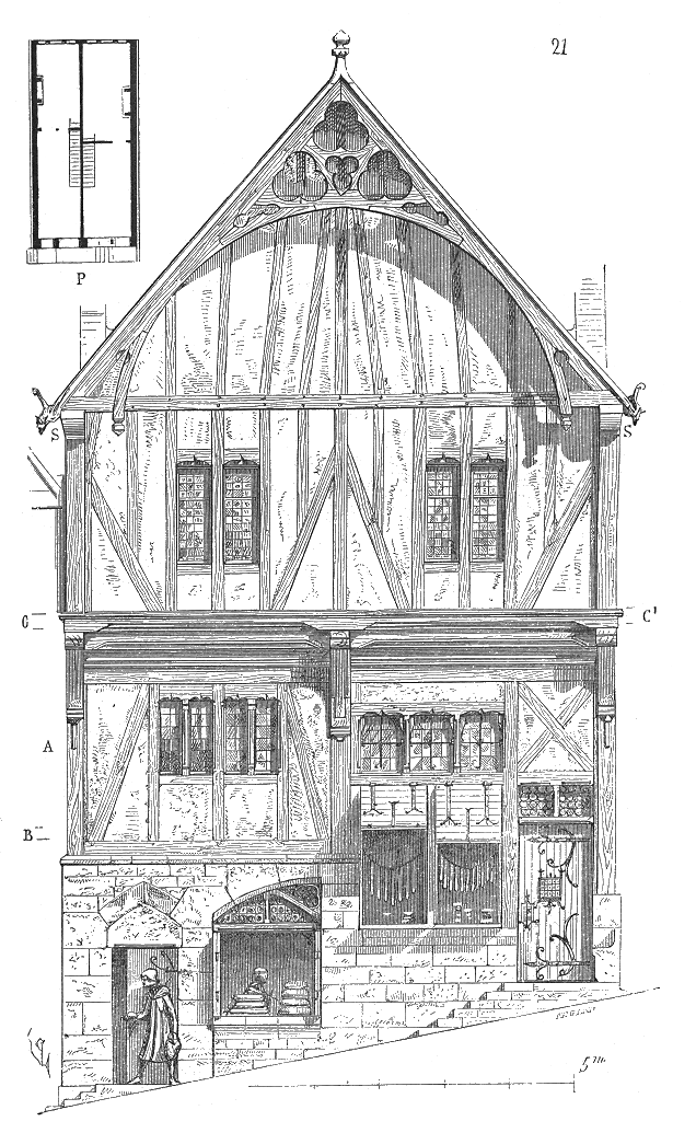 ... La figure 21 donne le plan et l'élévation d'une maison de Laval d'une époque un peu plus récente, mais où la structure de bois prend plus d'importance et s'élève en encorbellement sur le rez-de-chaussée. Cette maison, dont la façade s'élève sur une rue ayant une forte pente, est divisée pour deux ménages. La pente de la rue a permis au constructeur de donner un entre-sol A à l'habitant de gauche, les solivages des planchers étant en B et C; l'habitant de droite ne possède qu'un rez-de-chaussée élevé et un premier étage, le solivage du plancher étant au niveau C'. Ainsi que l'indique le plan P, chaque habitant possède son escalier, montant de la boutique au premier. Un pan de bois de refend posé dans l'axe de la façade sépare les deux habitations du haut en bas. Le pan de bois de face du premier étage est en saillie sur le nu du pan de bois du rez-de-chaussée et repose sur trois sablières en encorbellement ...